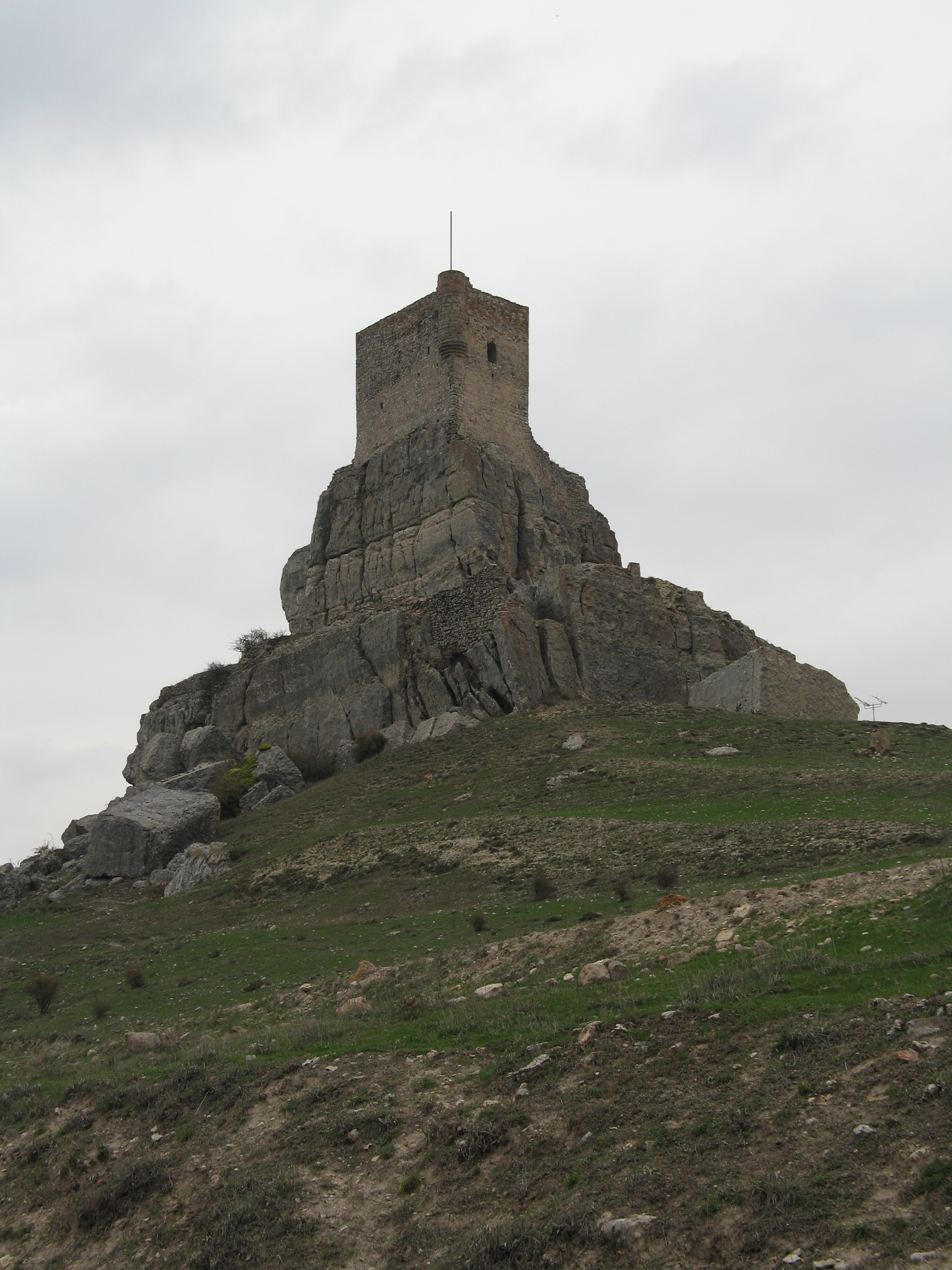 Castillo de Atienza. Atienza (Guadalajara, España)